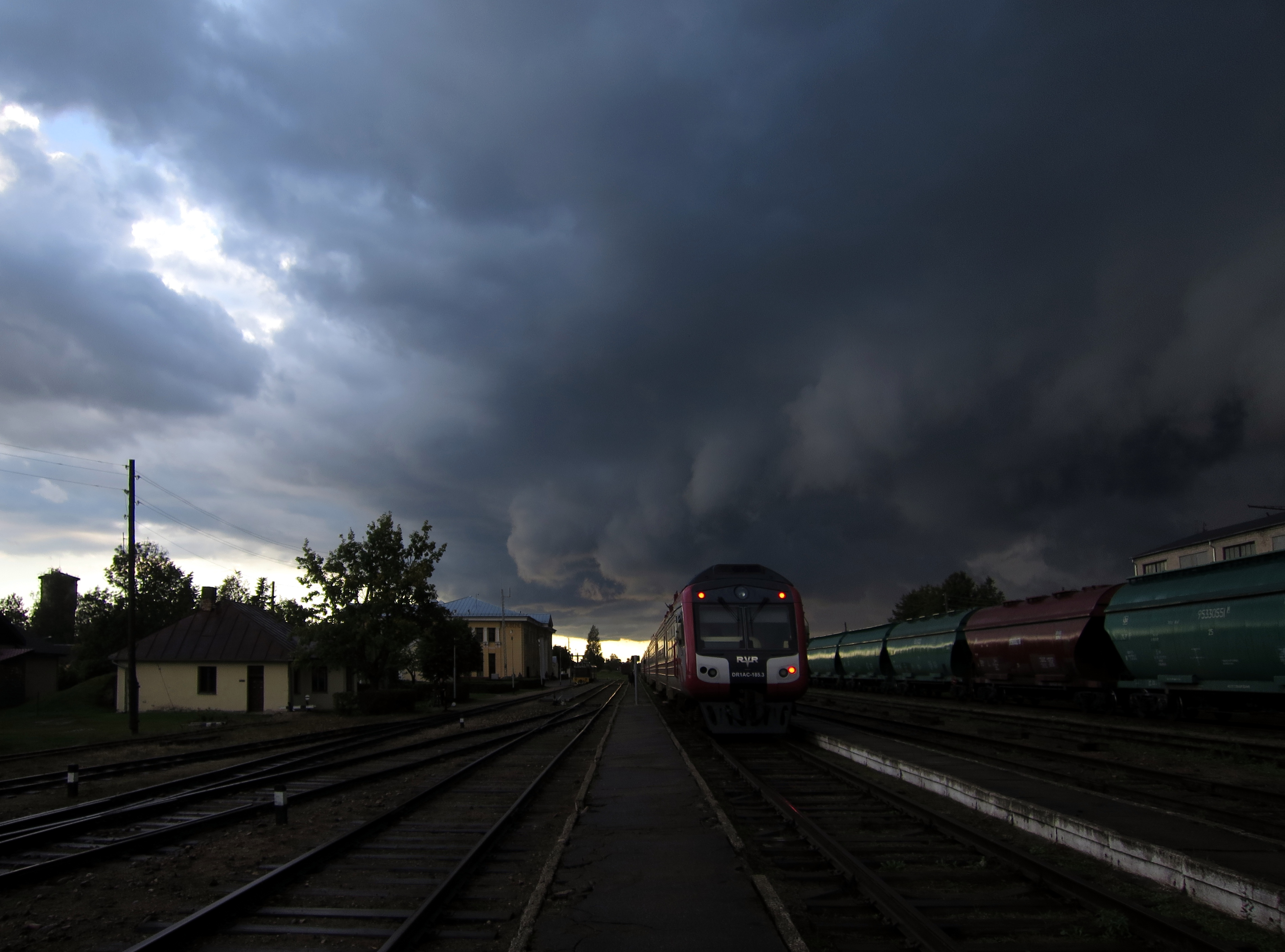 Gulbenes stacija